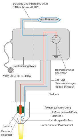 Schema eines Plasmabeams